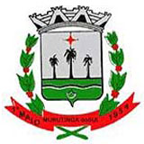 Brasão de Murutinga do Sul